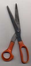 huishoudschaar; eigen foto